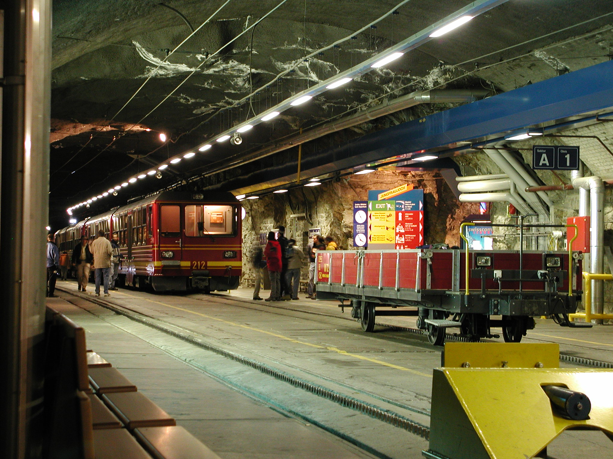 Bahnstation Jungfraujoch im Felsinneren mit Bhe 4/8 212 und einem weiteren Doppeltriebwagen desselben Typs; davor der Flachwagen M 72